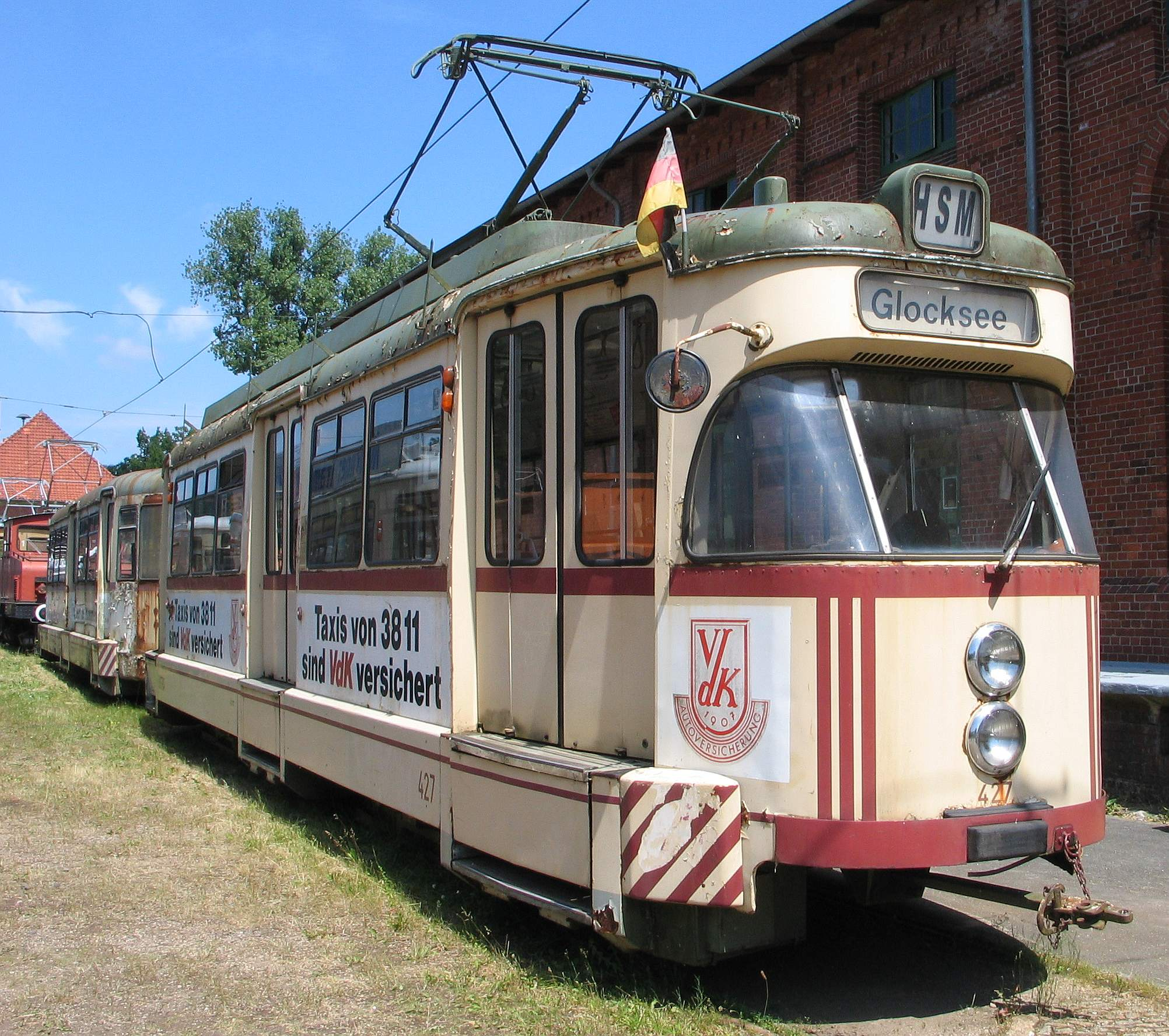 Tunnelgängig umgebauter TW400 aus Hannover im Juni 2005 im Straßenbahnmuseum Hannover in Sehnde-Wehmingen. Zu sehen sind insbesondere die Klapptrittstufen, die für die Hochbahnsteige nötig gewesen wären. Die Fahrzeuge wurden nie im Tunnel eingesetzt.